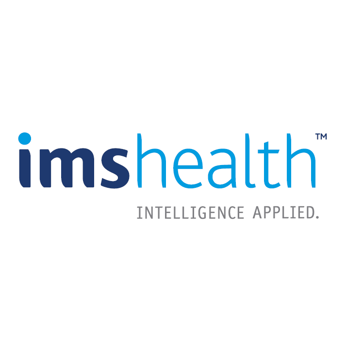 Az IMS Health cég logója